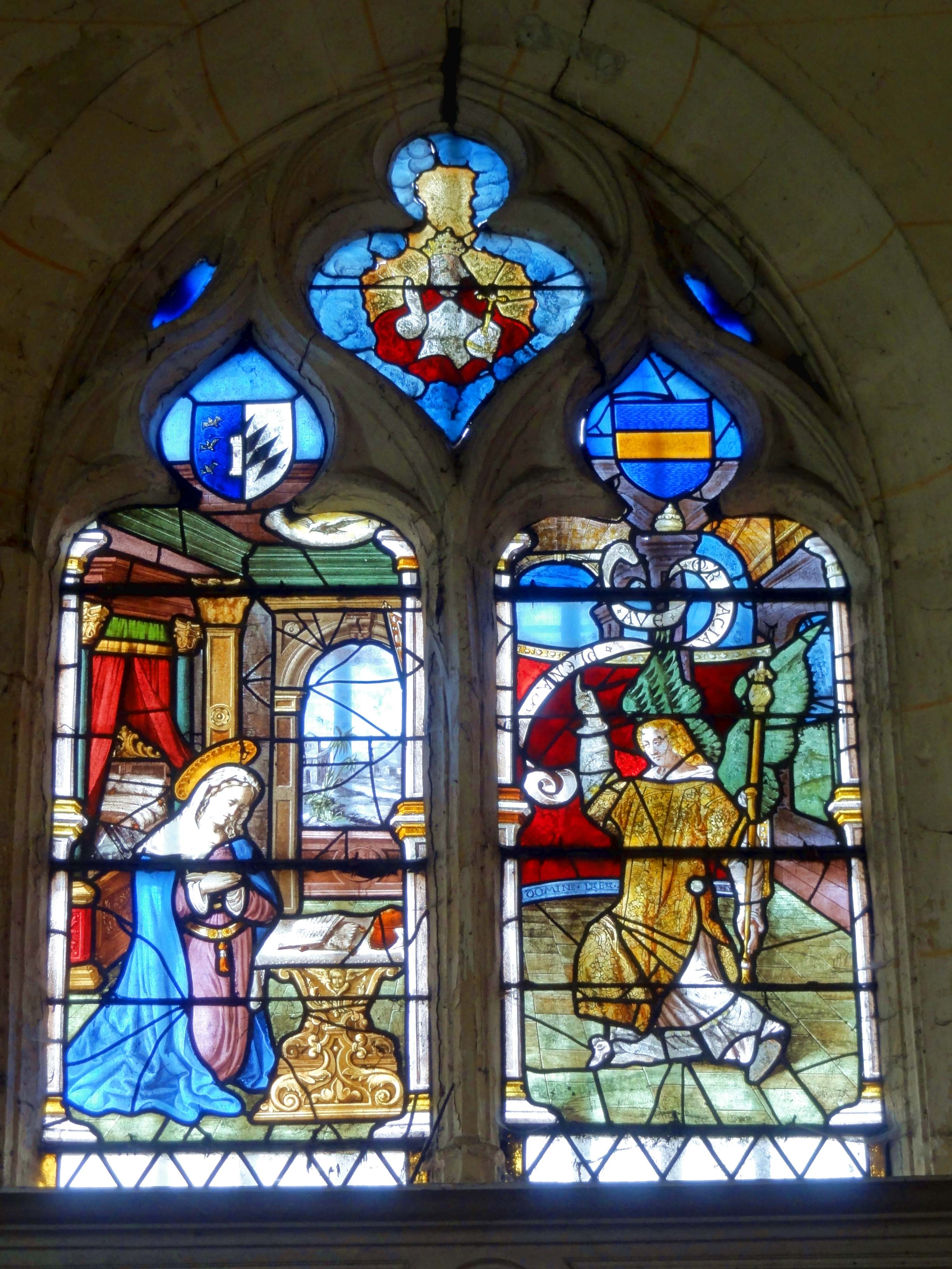 Verrière n° 1 - Annonciation, premier quart XVIe siècle.